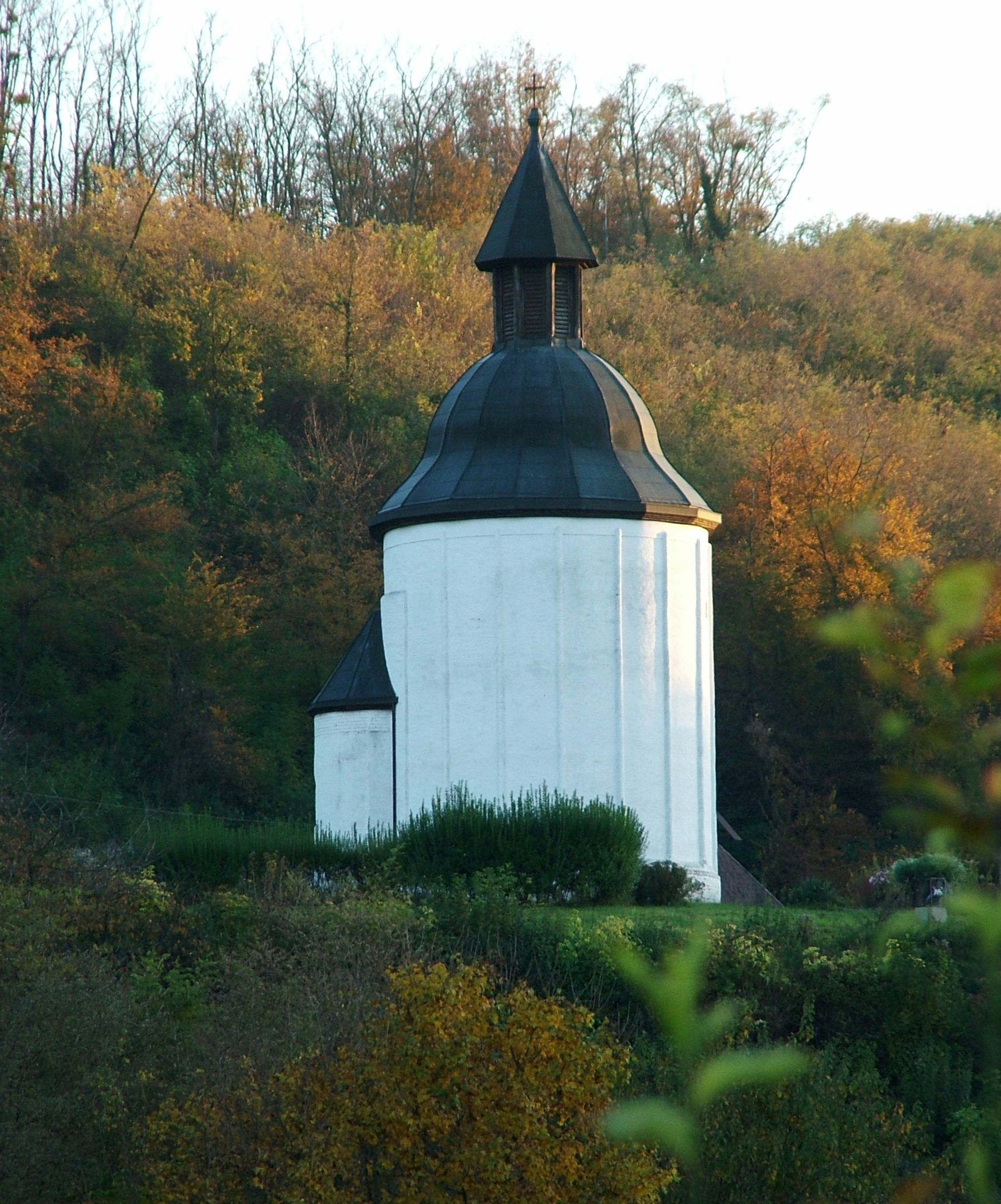 Saint Anne Church - Kallósd, Hungary